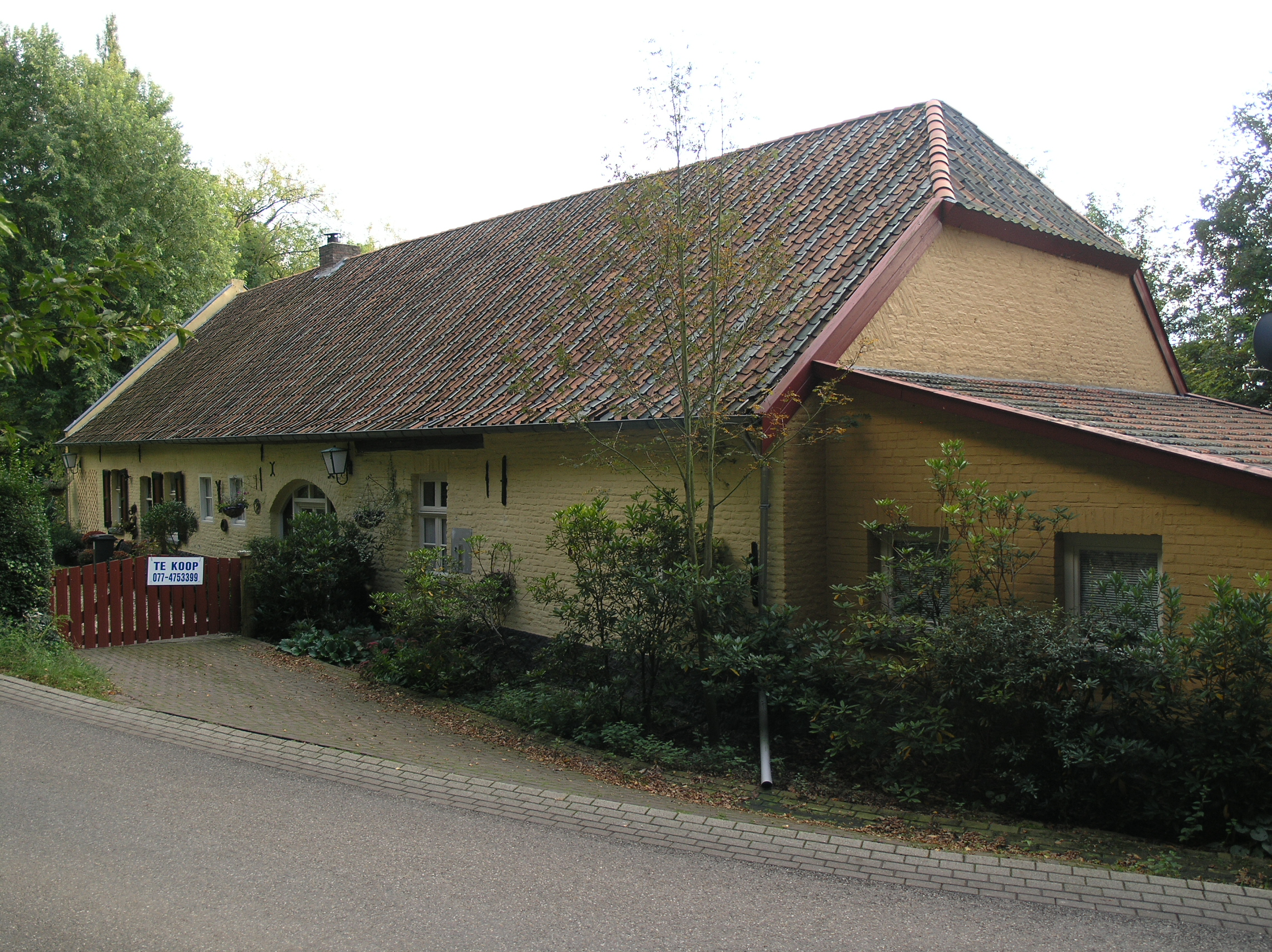 Belfeld Maalbekermolen